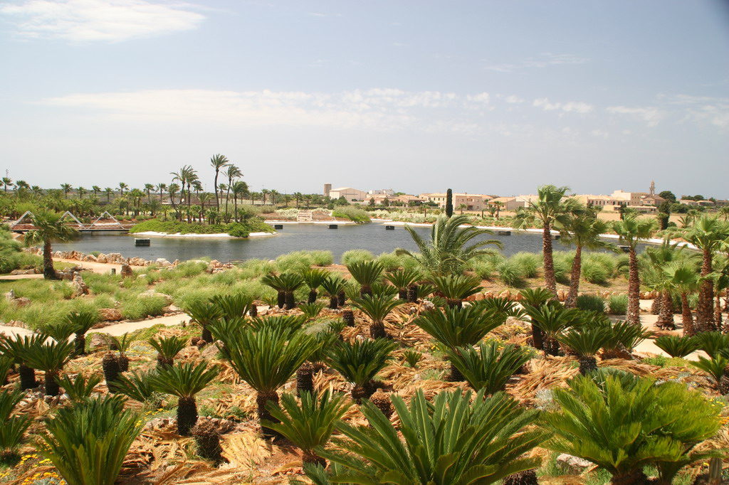 Botanicactus See